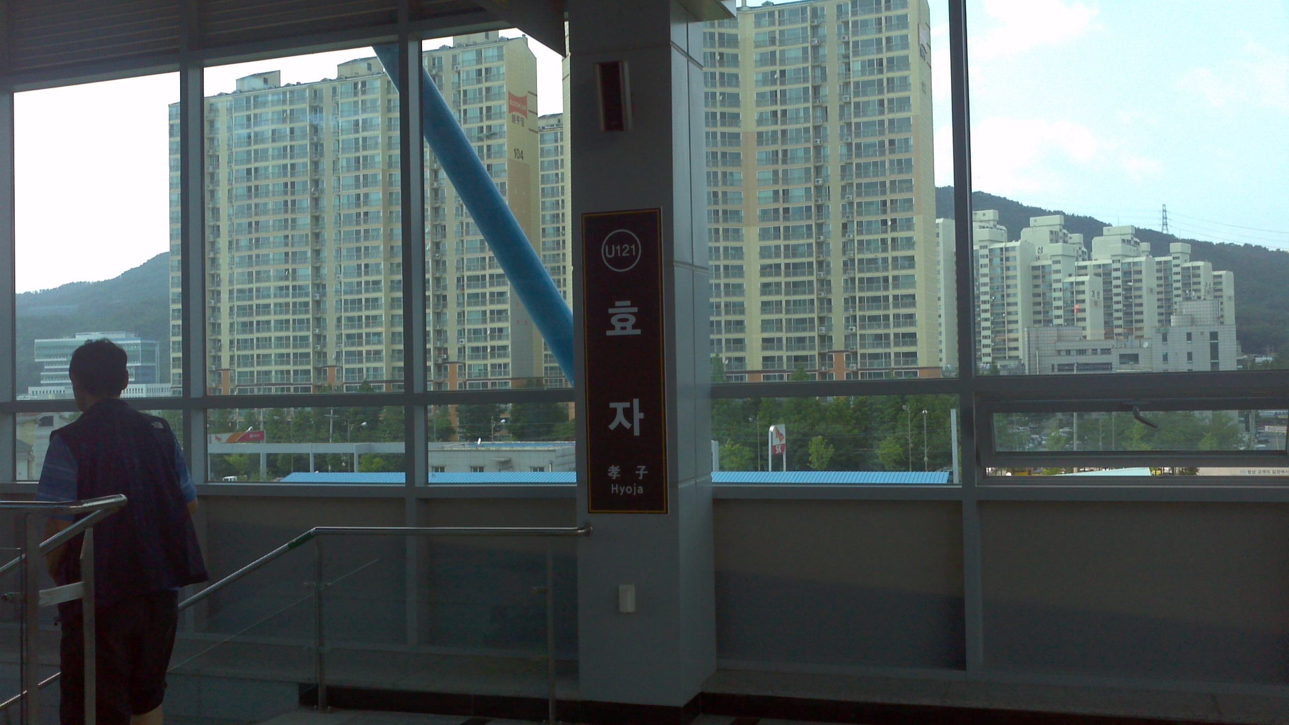 범골역 역명판